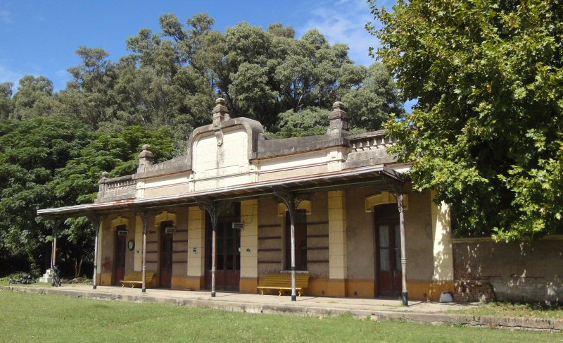 Estación La Verde del FCGB, ex FFCC CGBA